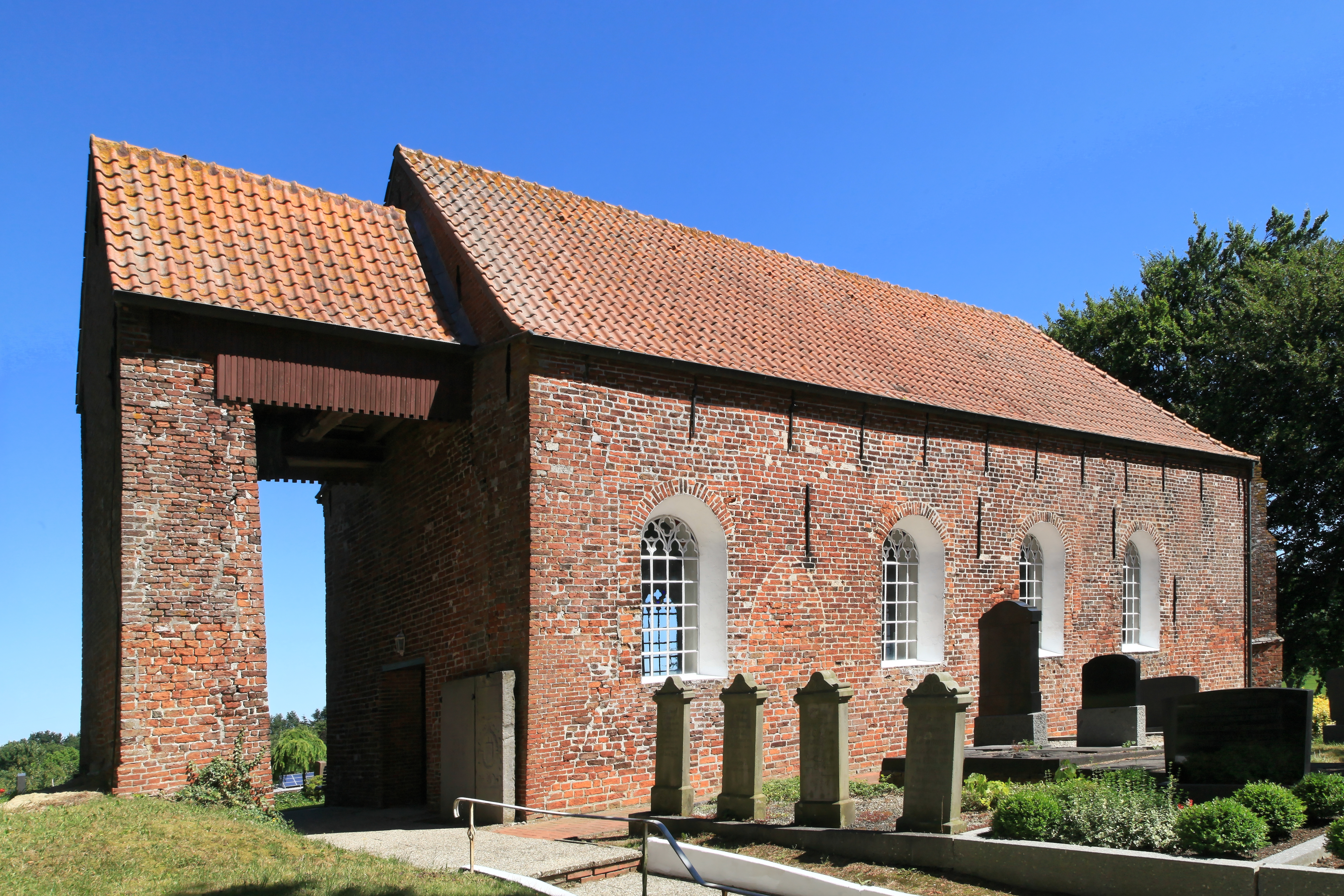 Mitling-Marker Kirche hinter dem Friedhof Mitling-Mark, Warftweg/Mitlinger Kirchweg in Westoverledingen